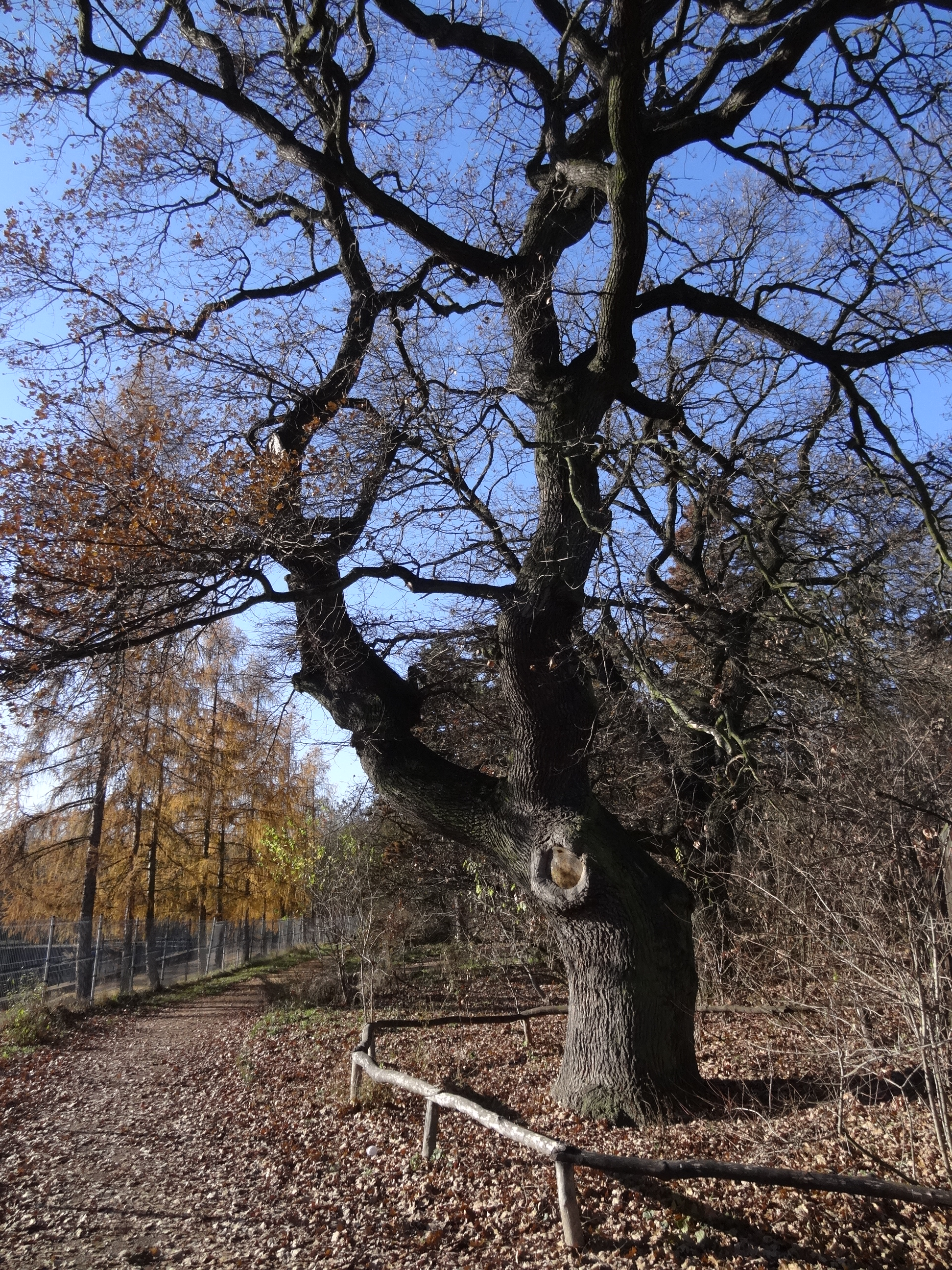 Praha-Kamýk - památný dub letní V Hrobech